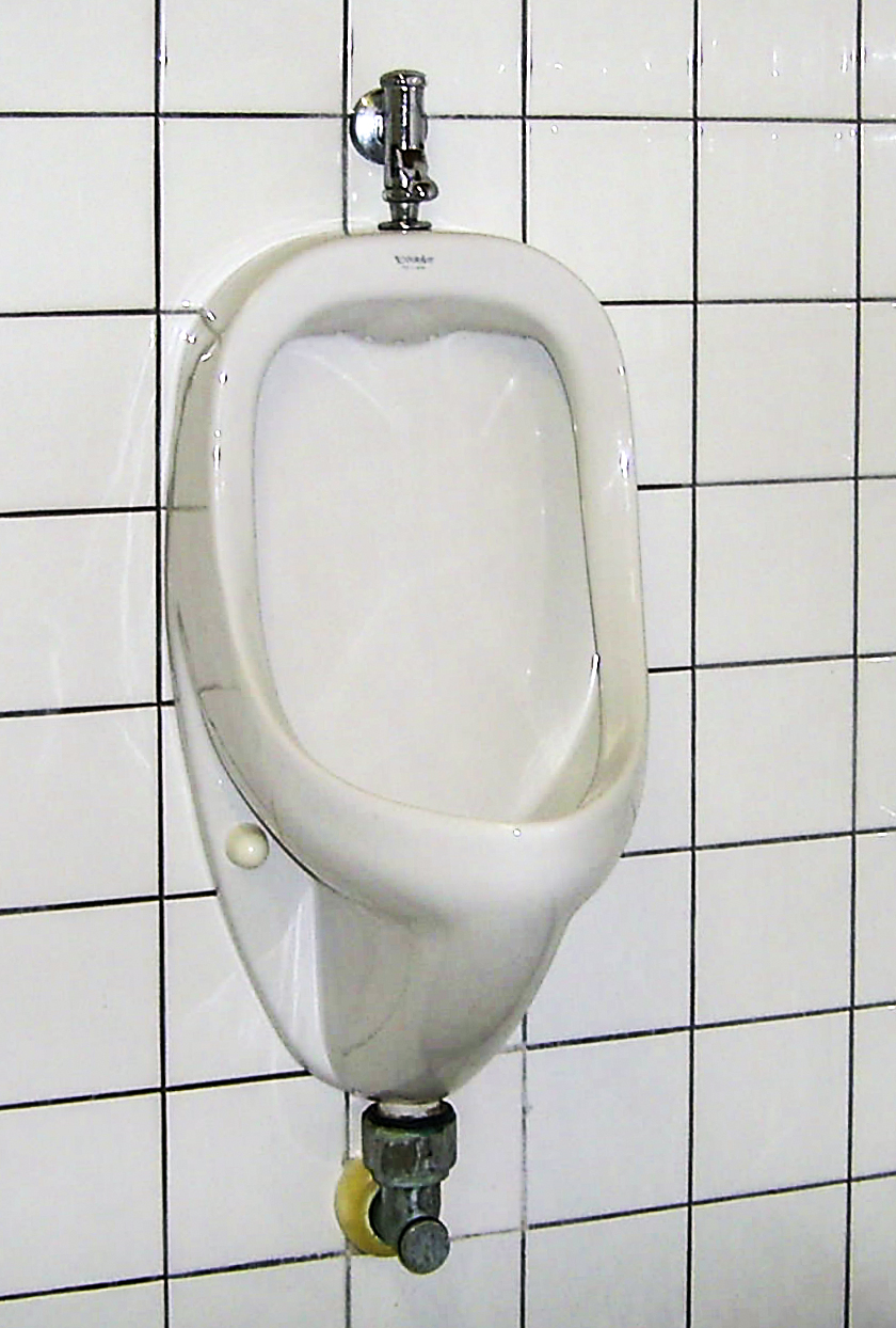 Urinal in einer Gaststätte in Mainhardt, Lkr. Schwäbisch Hall, Baden-Württemberg, Germany